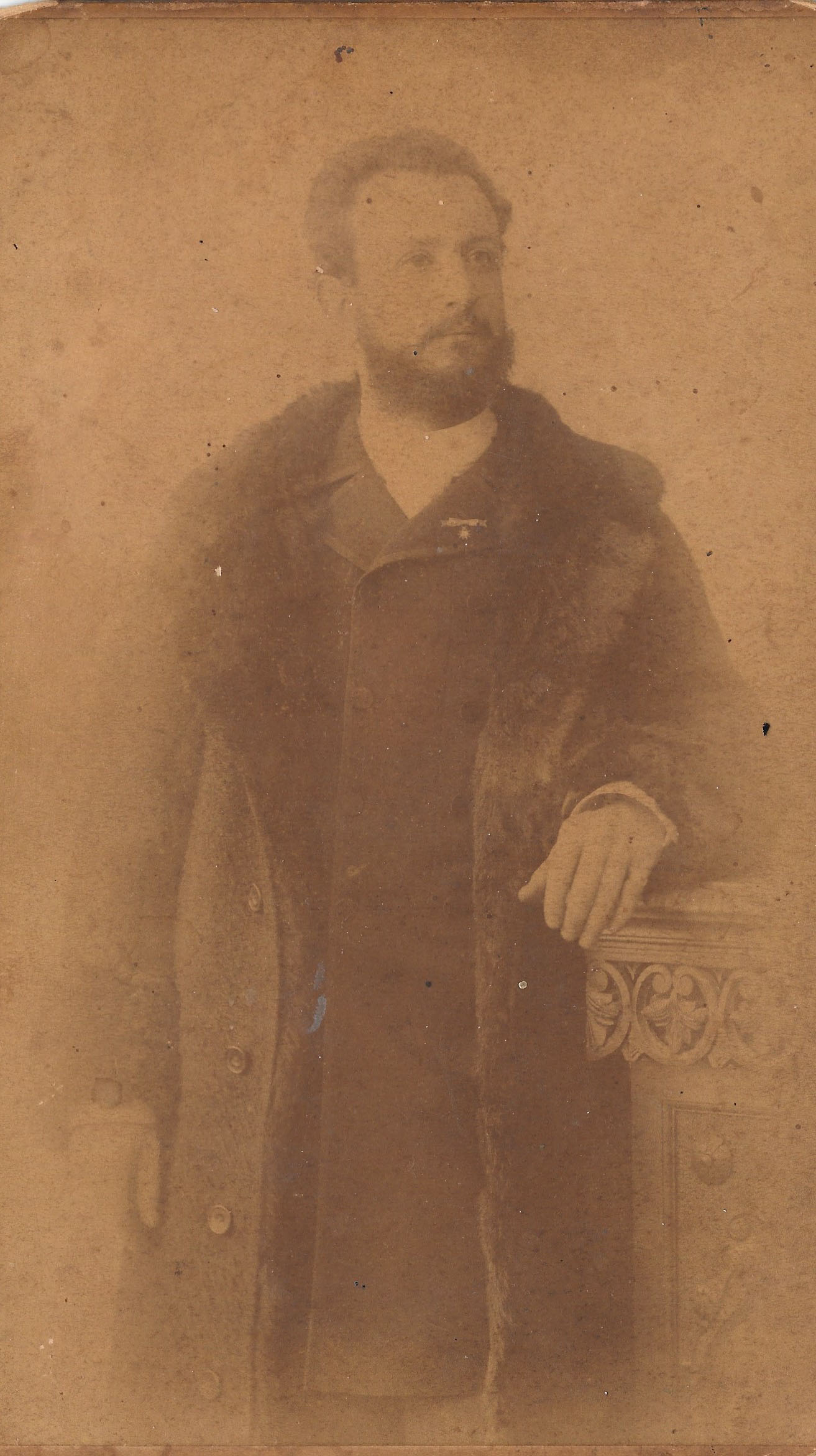 retrato